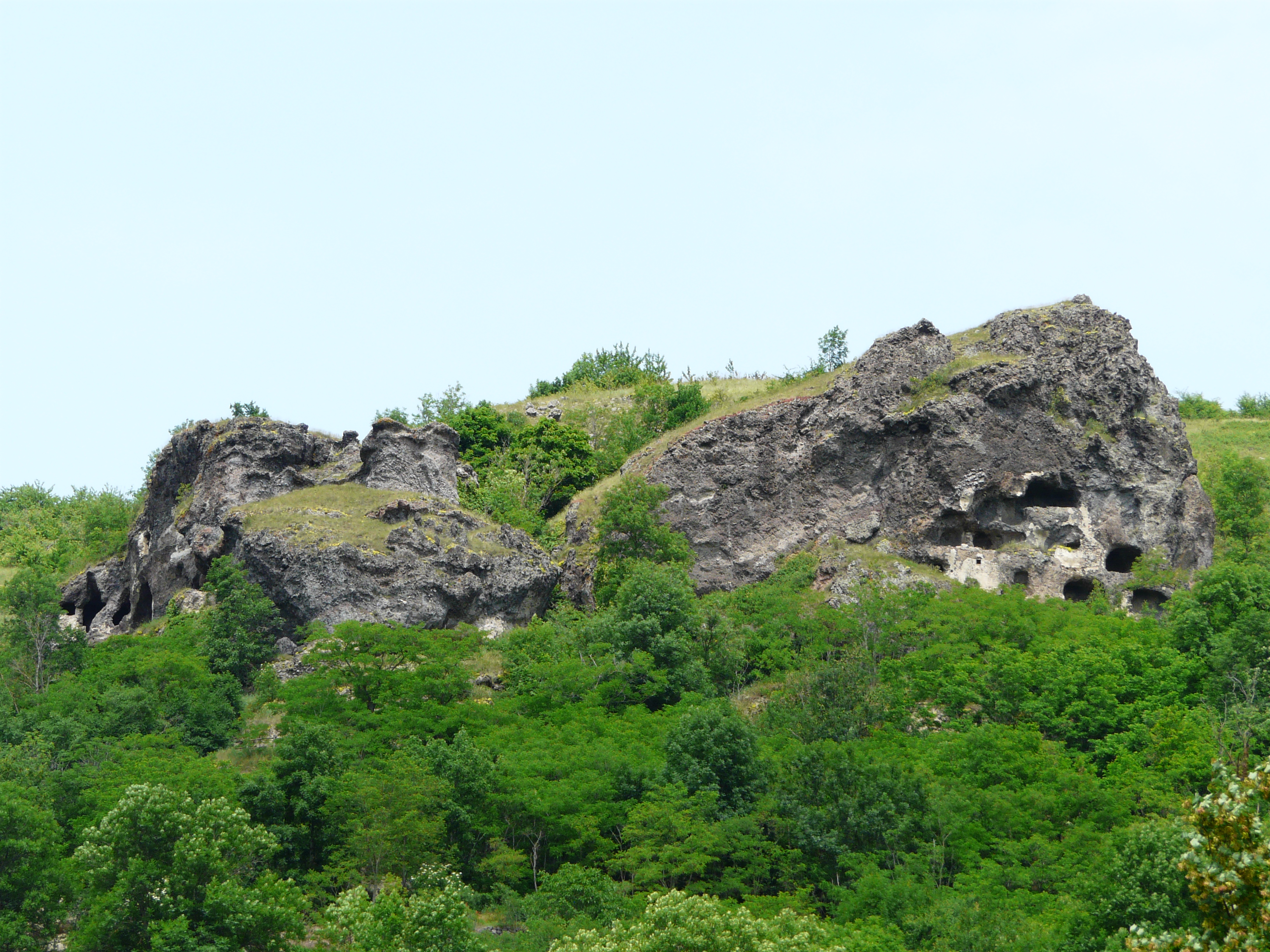 Les grottes de Perrier, Puy-de-Dôme, France.